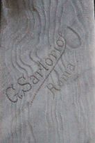 Particolare della firma dello scultore